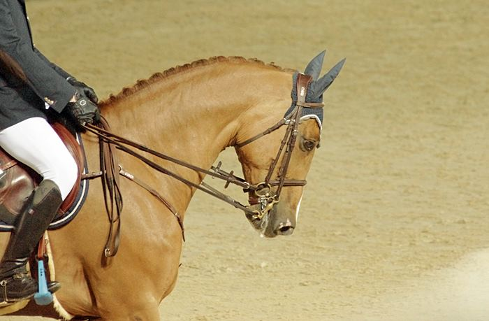 Kevin Staut et Uchin van de Centaur, dans le Prix Le Touessrok, lors du Global Champions Tour de Cannes (juin 2012).